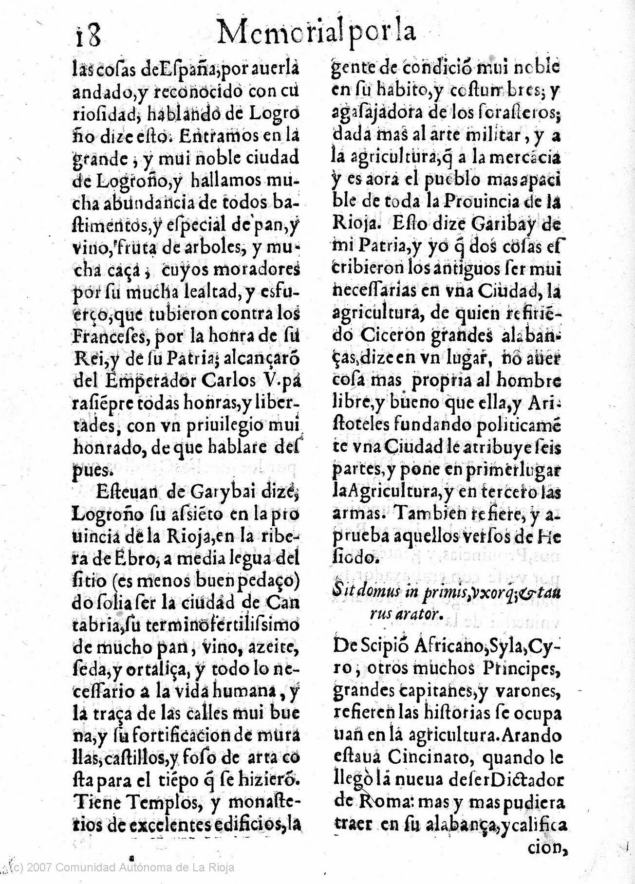 Página 18 del memorial por la ciudad de Logroño de Fernando Albia de Castro (año 1633). Esta página habla de la localización de Logroño, dice que esta situada en la provincia de La Rioja en la ribera del Ebro.